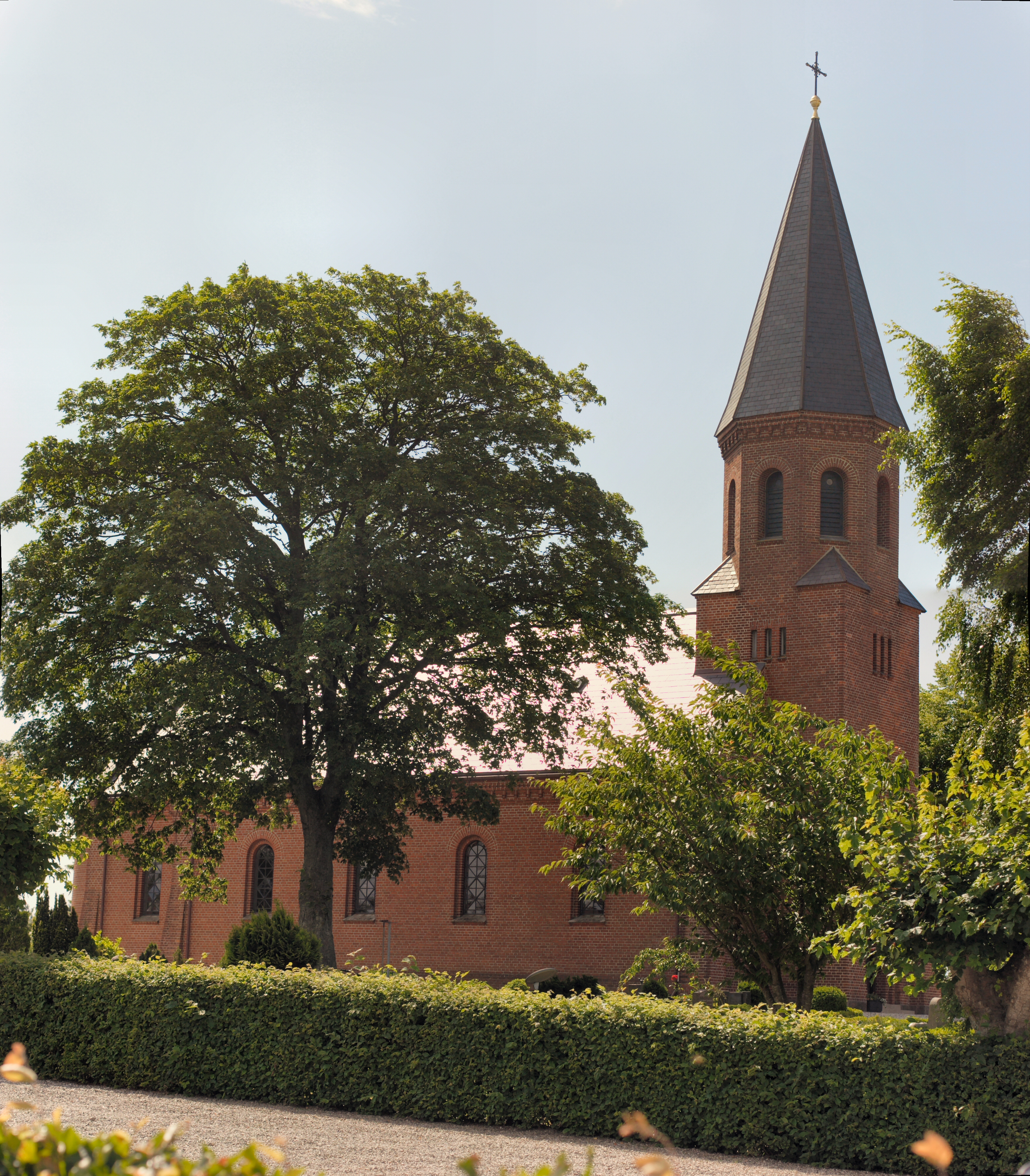 Vrinners kirke